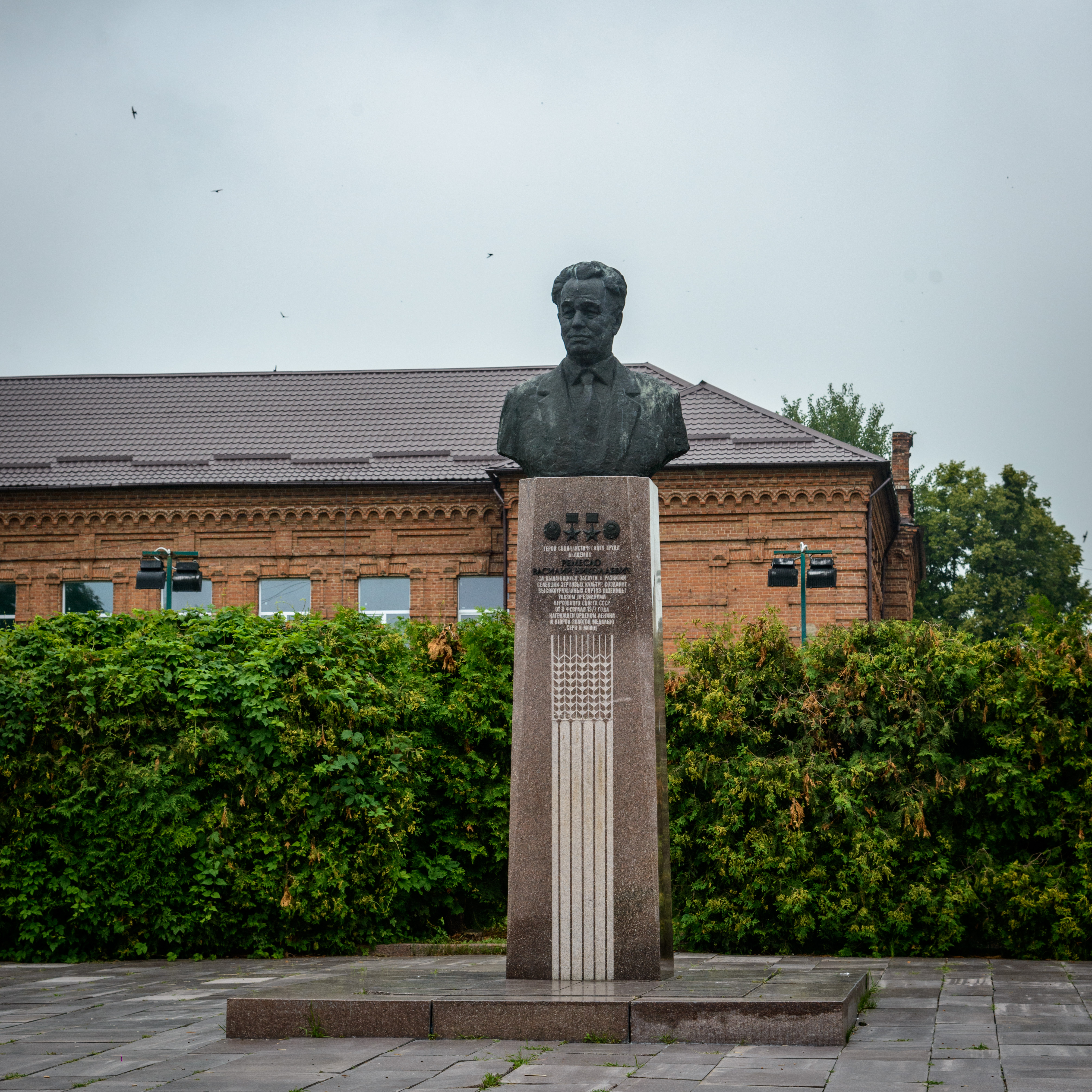 Пам'ятник-бюст двічі Герою Соціалістичної Праці М. В. Ремесла, Пирятин, вул. Леніна